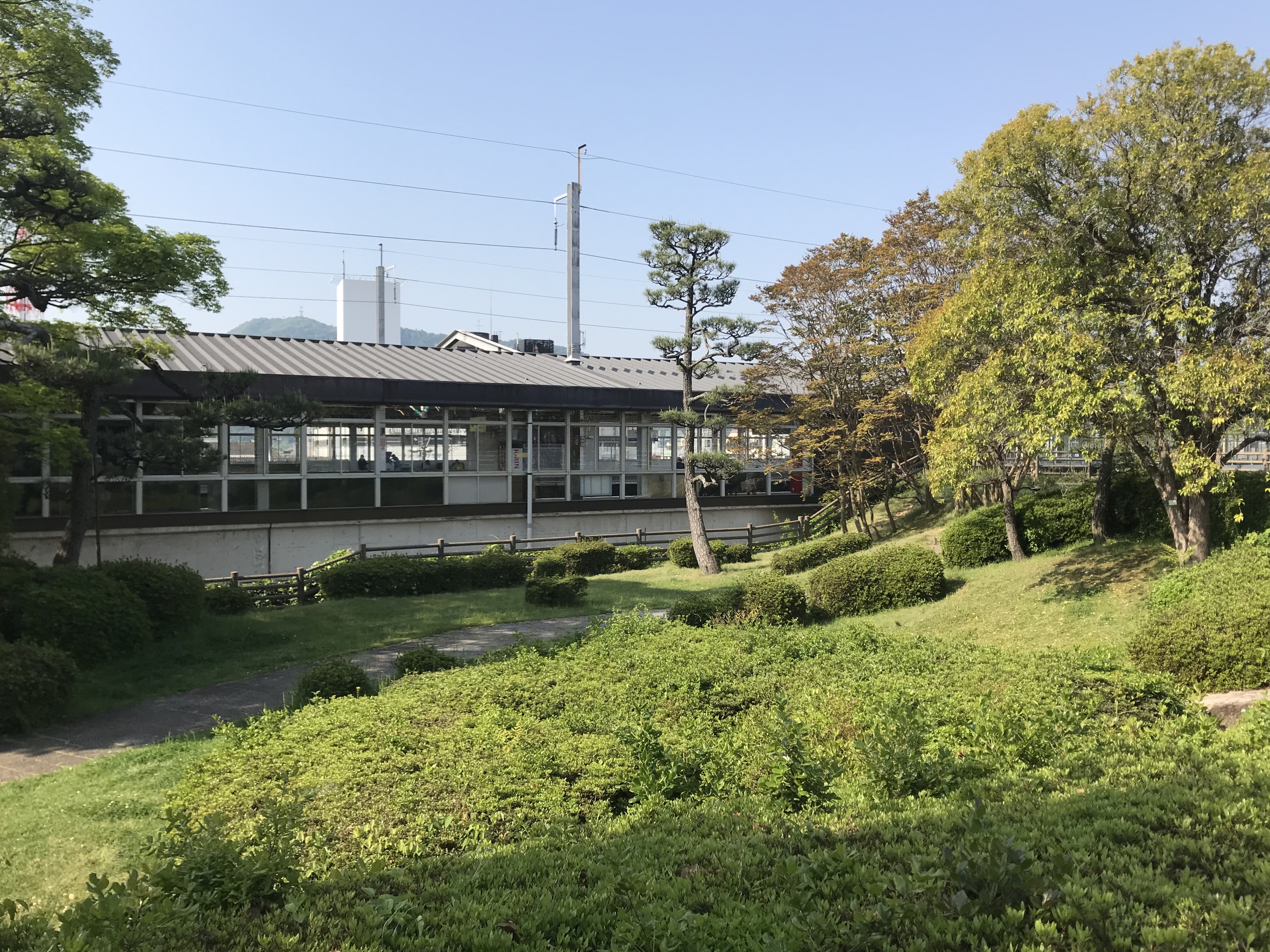 三原城の天主台と三原駅